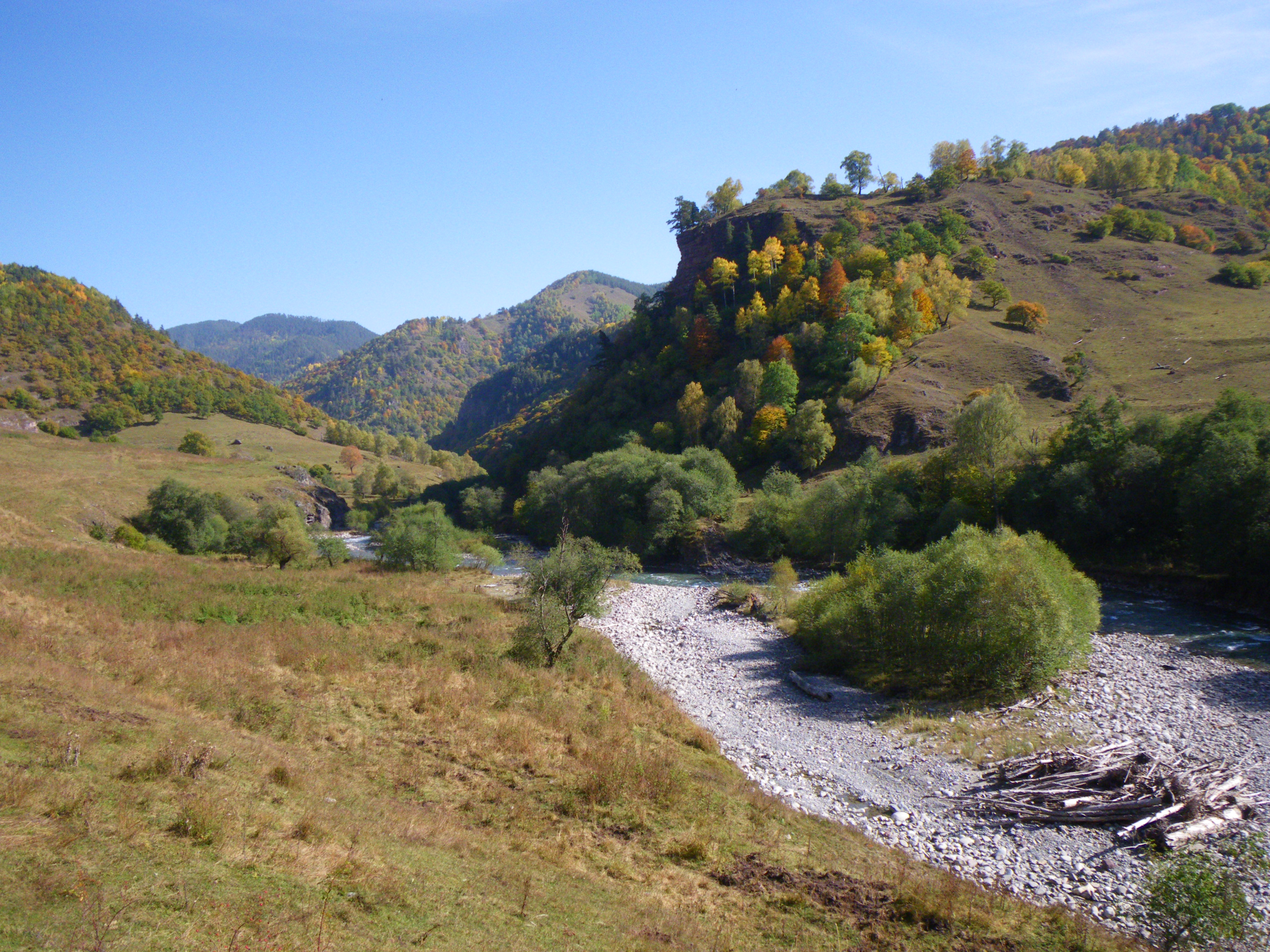 Аксаут